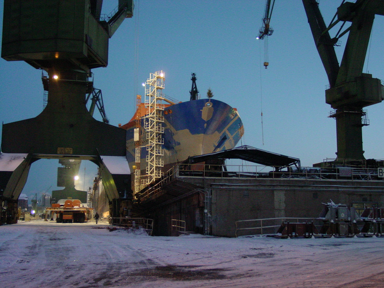 Stocznia Gdańska - statek w budowie, dzień przed wodowaniem